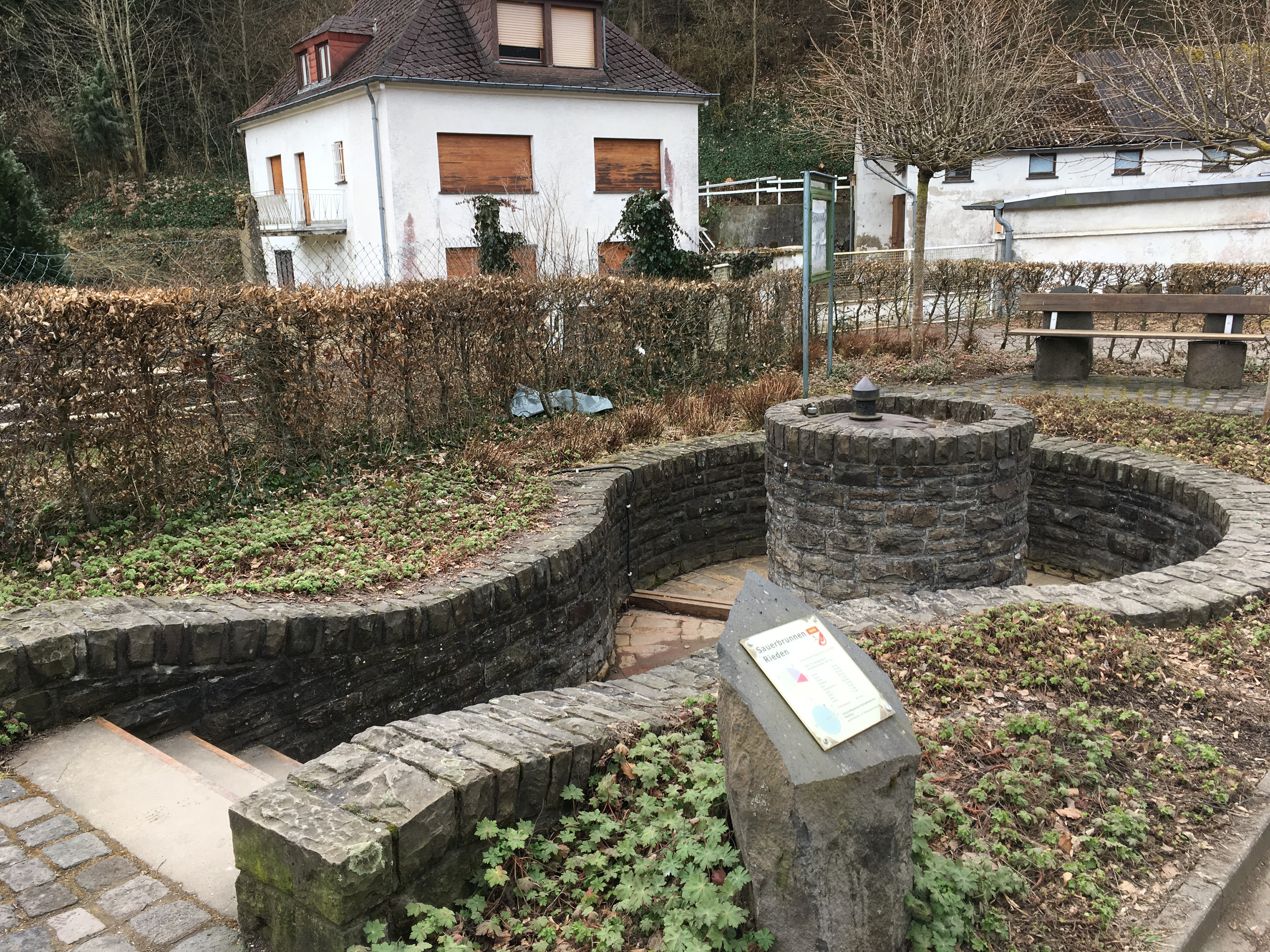 Sauerbrunnen mit Infotafel in Rieden, Rheinland-Pfalz